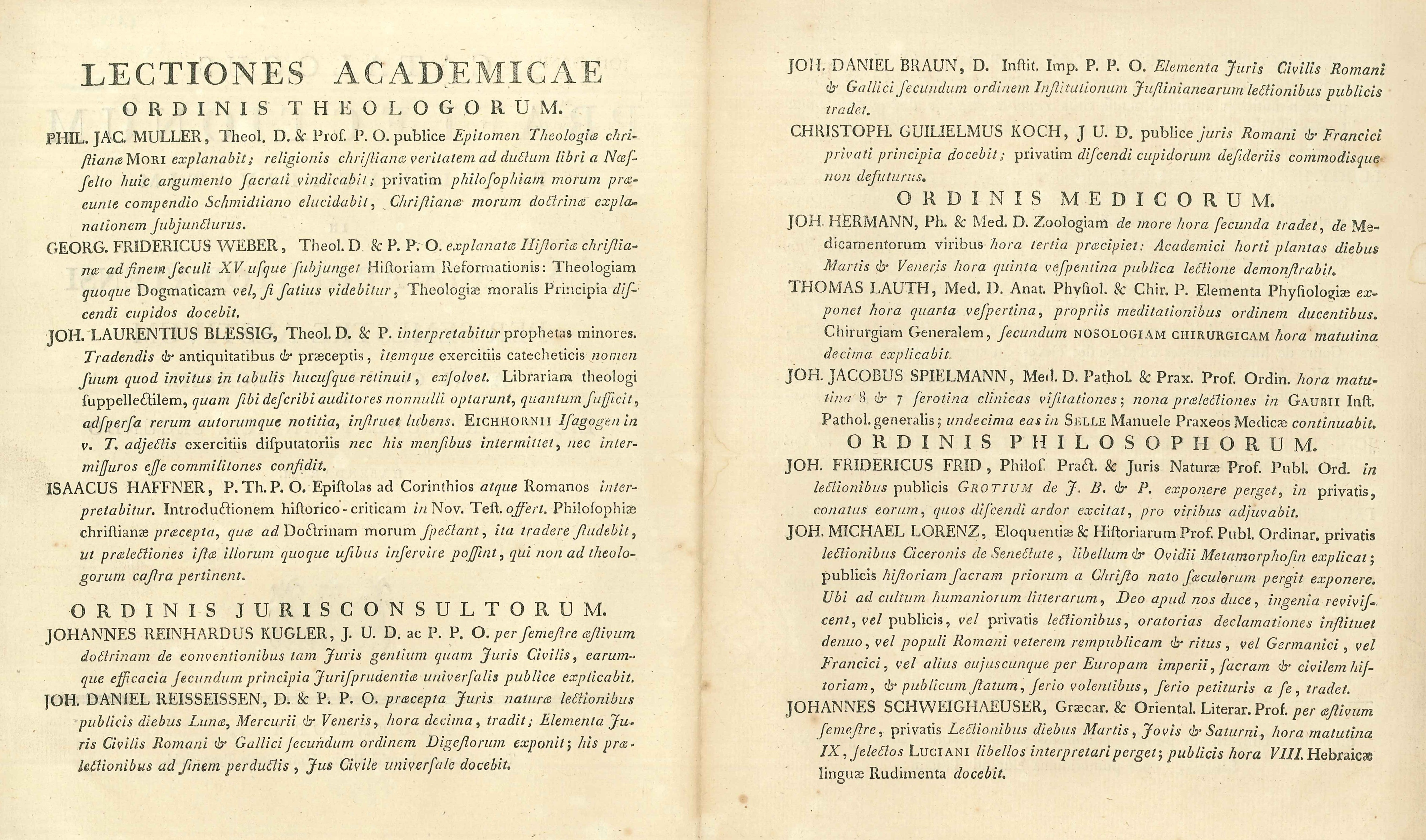 Extrait d'un fascicule cataloguant les publications faites par les professeurs de la Faculté de théologie protestante de Strasbourg en 1793, pendant la Révolution. On peut notamment voir les noms de Blessig, Haffner et Koch.